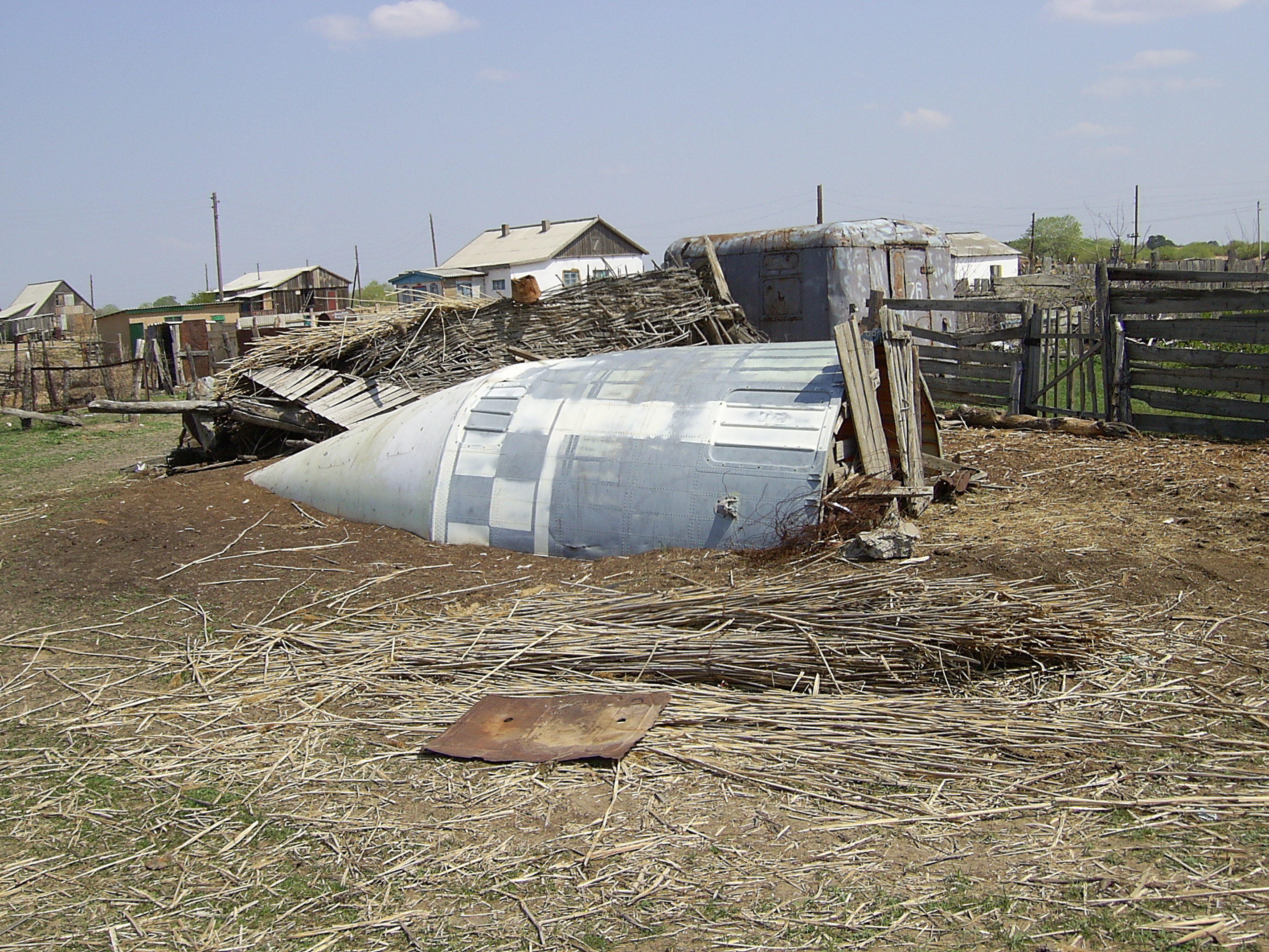 Обломки ракет усеяны по всем Рын-пескам